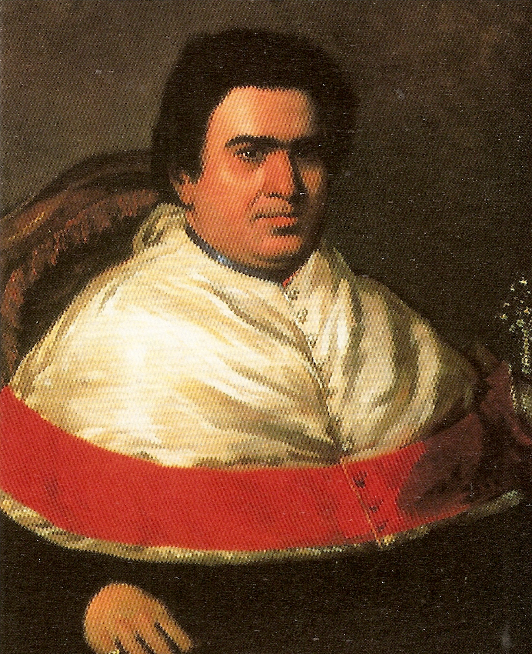 Obispo Juan H. Bosset del Castillo. 1844 Óleo/tela. Colección Galería de Arte Nacional, Caracas - Venezuela